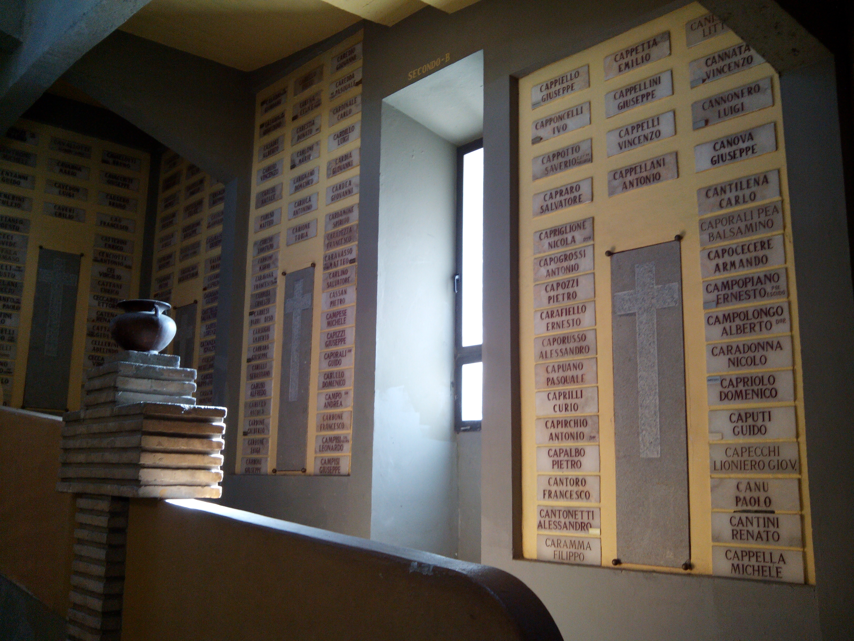 Church of San Antonio de Padua and Sacrario Militare Italiano, Zaragoza.